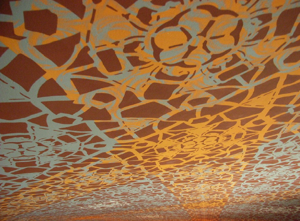 Deckengemälde der Alt-Katholischen Friedenskirche Essen